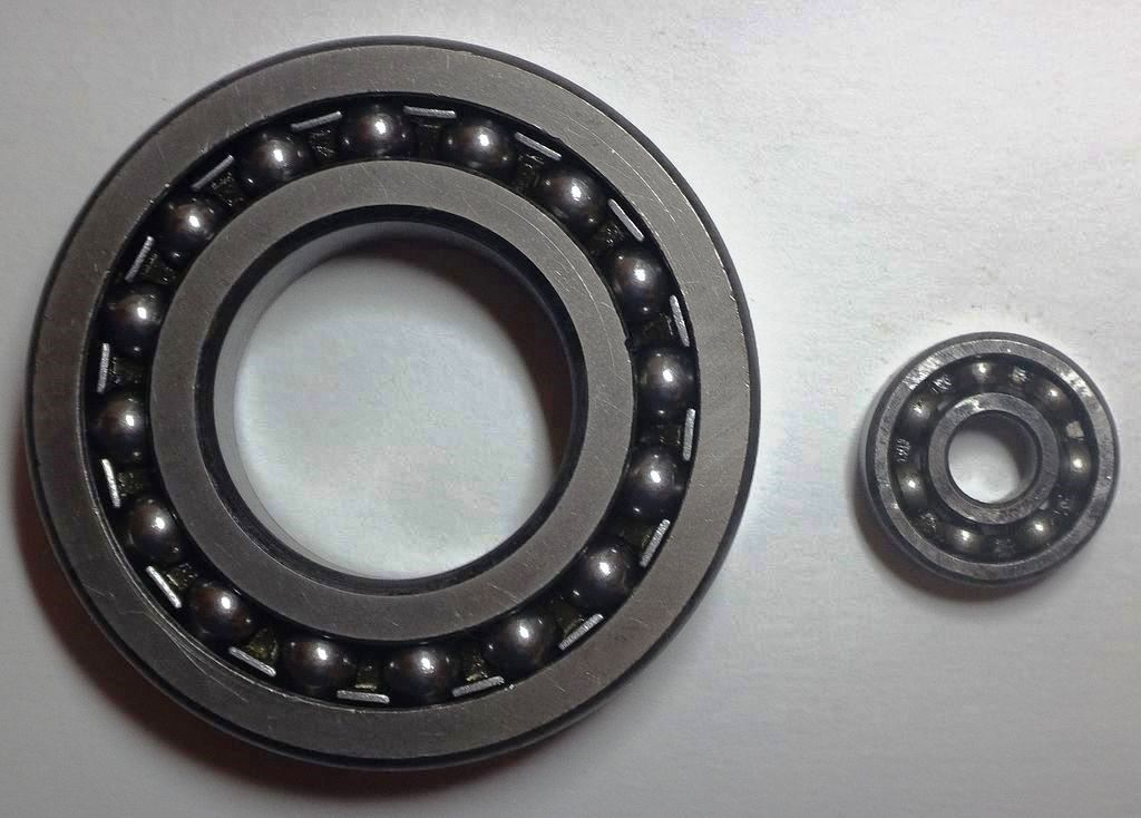 Промышленные шарикоподшипники